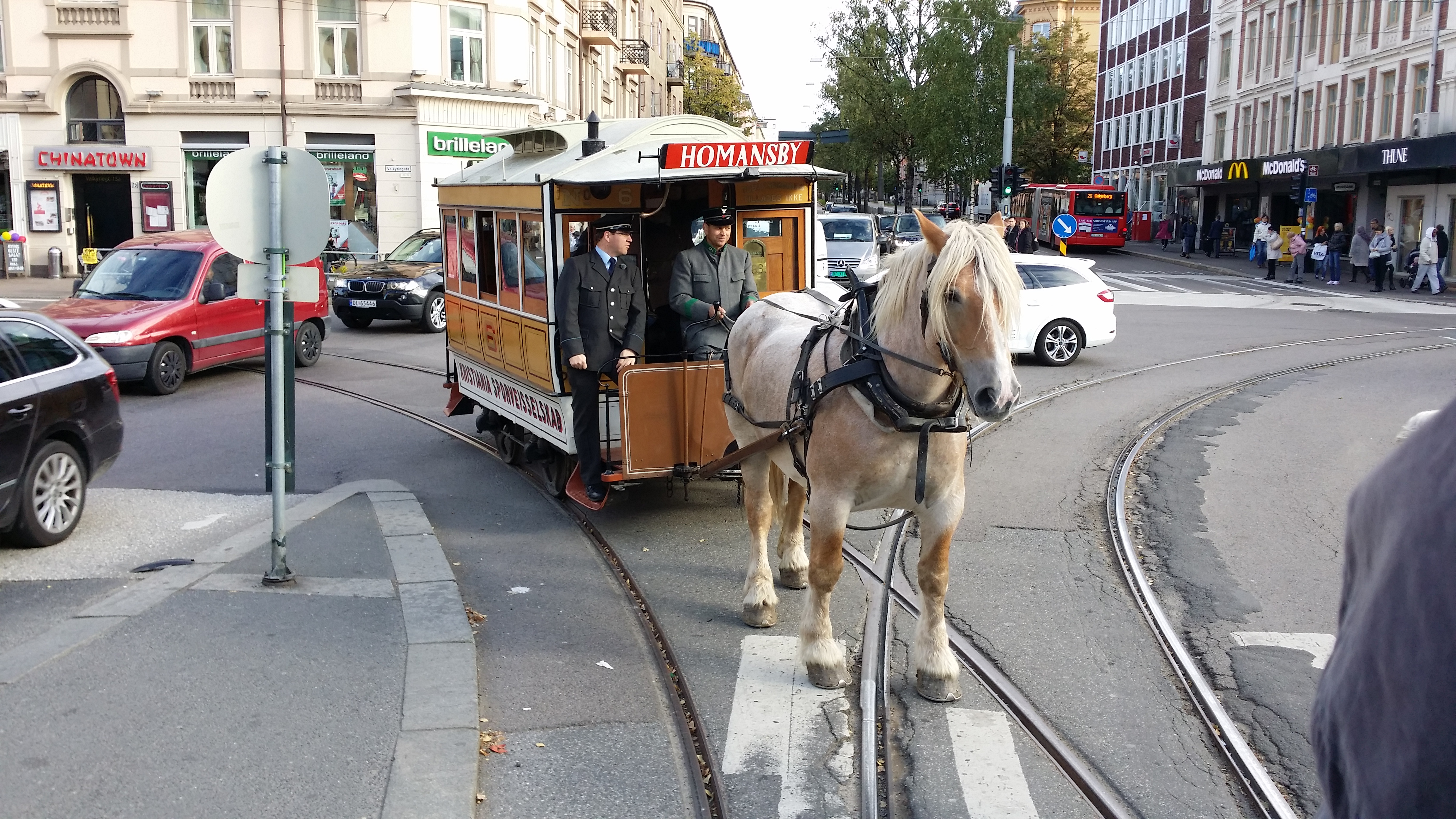 Museumsvogn fra 1875 kjøres i anledning 140-årsdagen for sporveiens åpning 6. oktober 2015.